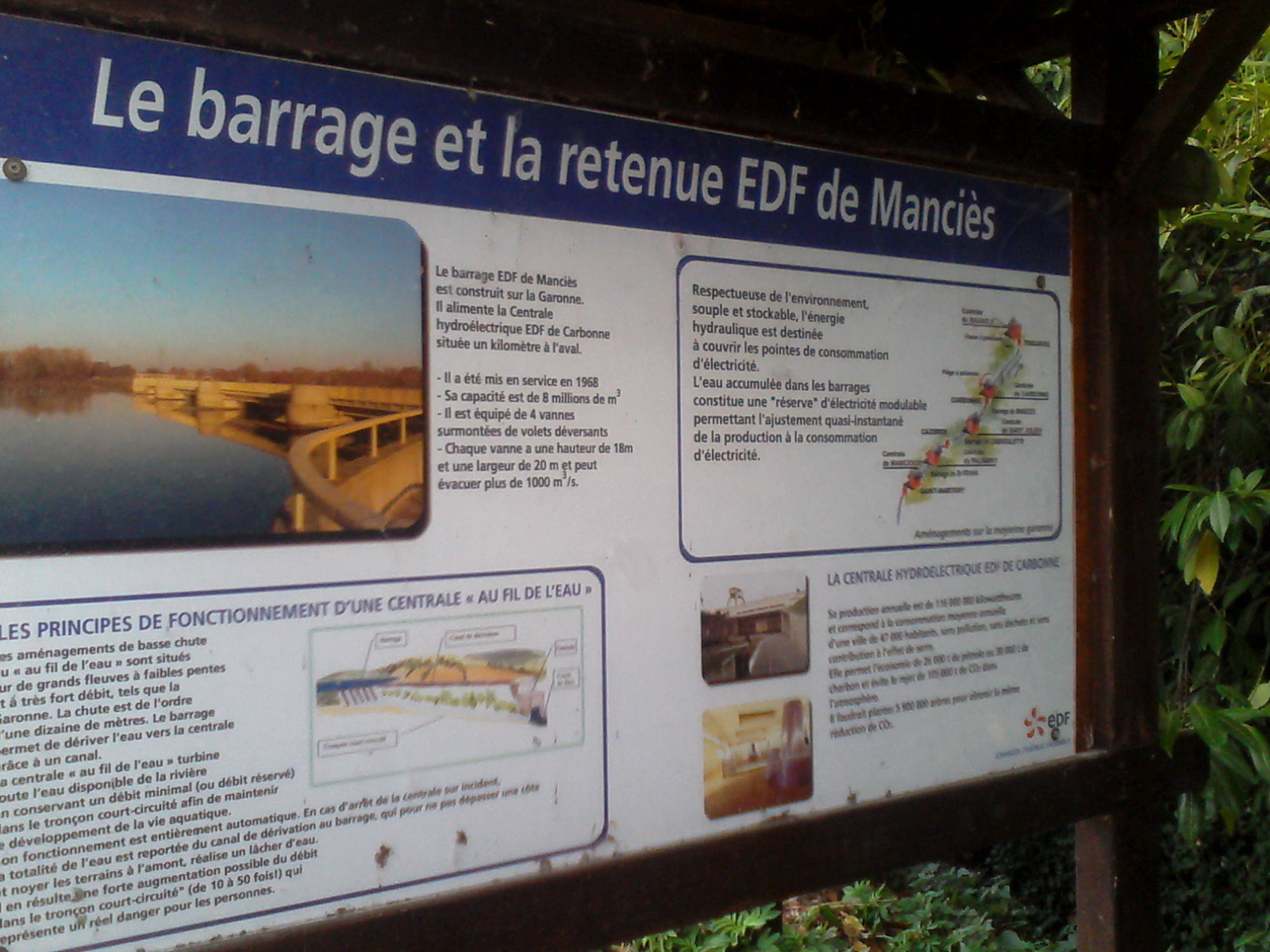 Barrage de Mancies